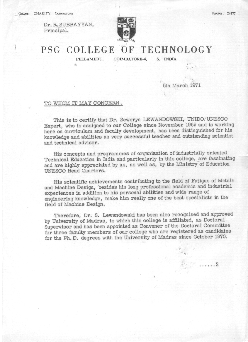 Zaświadczenie o pracy w PSG College of Technology